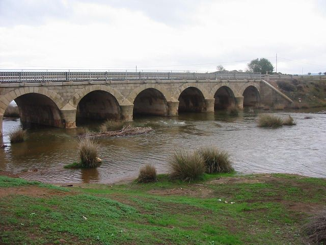 Puente sobre el río Algodor a su paso por la N-401. Término municipal de Los Yébenes (Toledo)